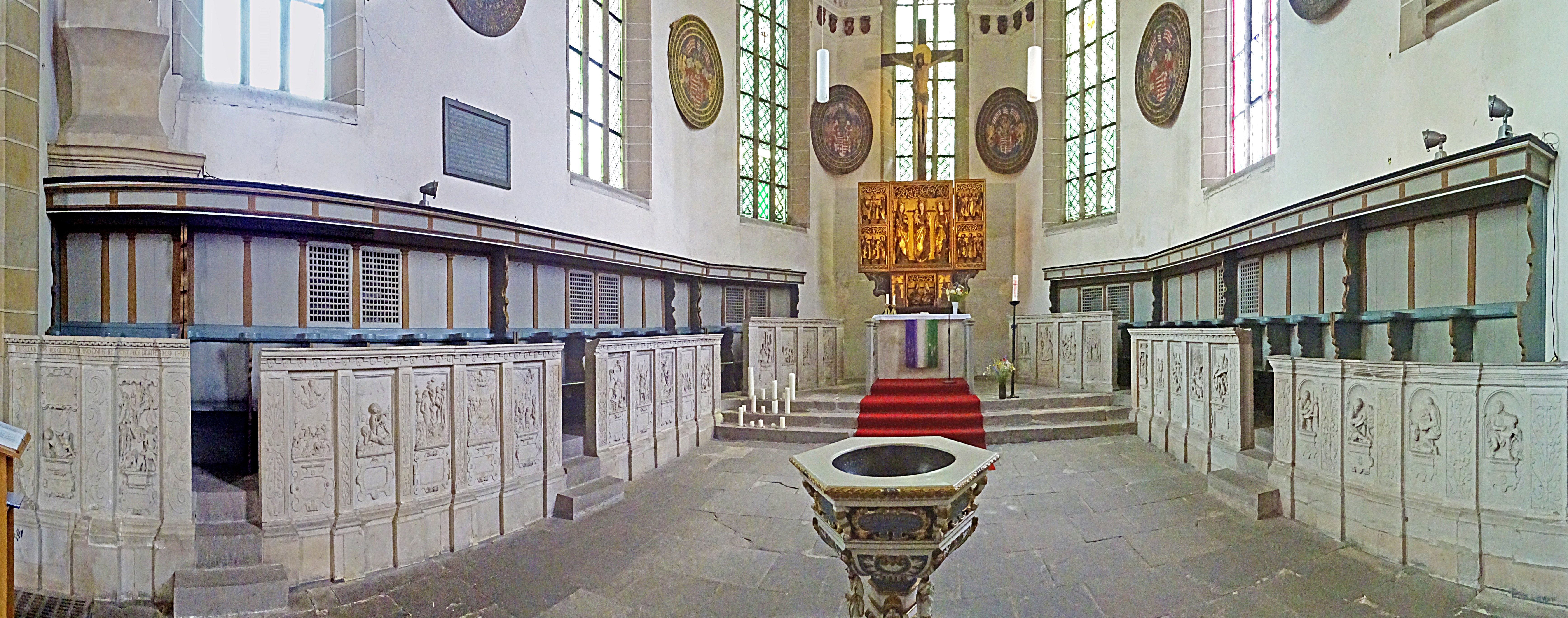 Steinbilderbibel in der St. Annenkirche (Eisleben), Übersicht